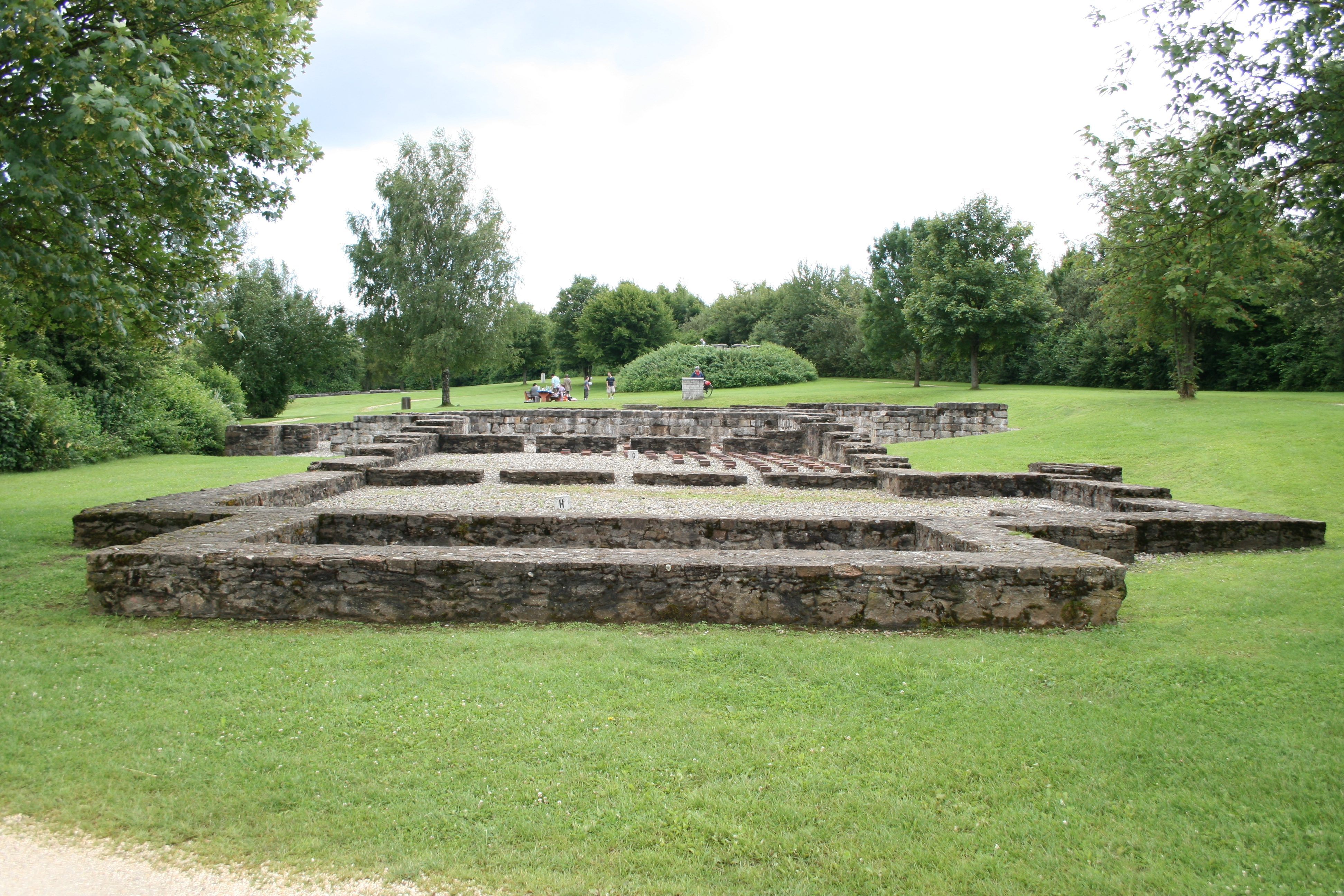 Ansicht des Badegebäudes vom Kastell Buch von Norden.